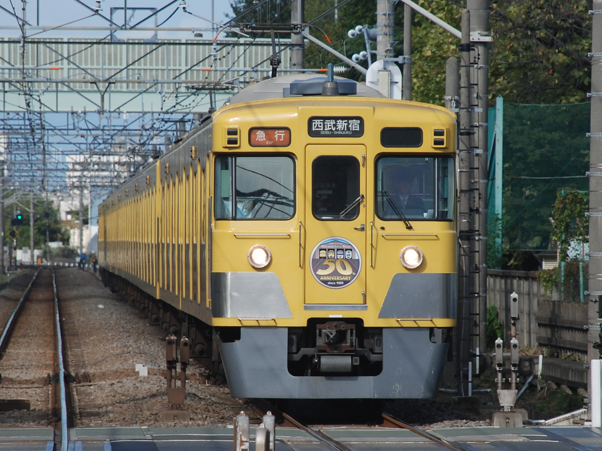 花小金井で撮った西武2000系です。